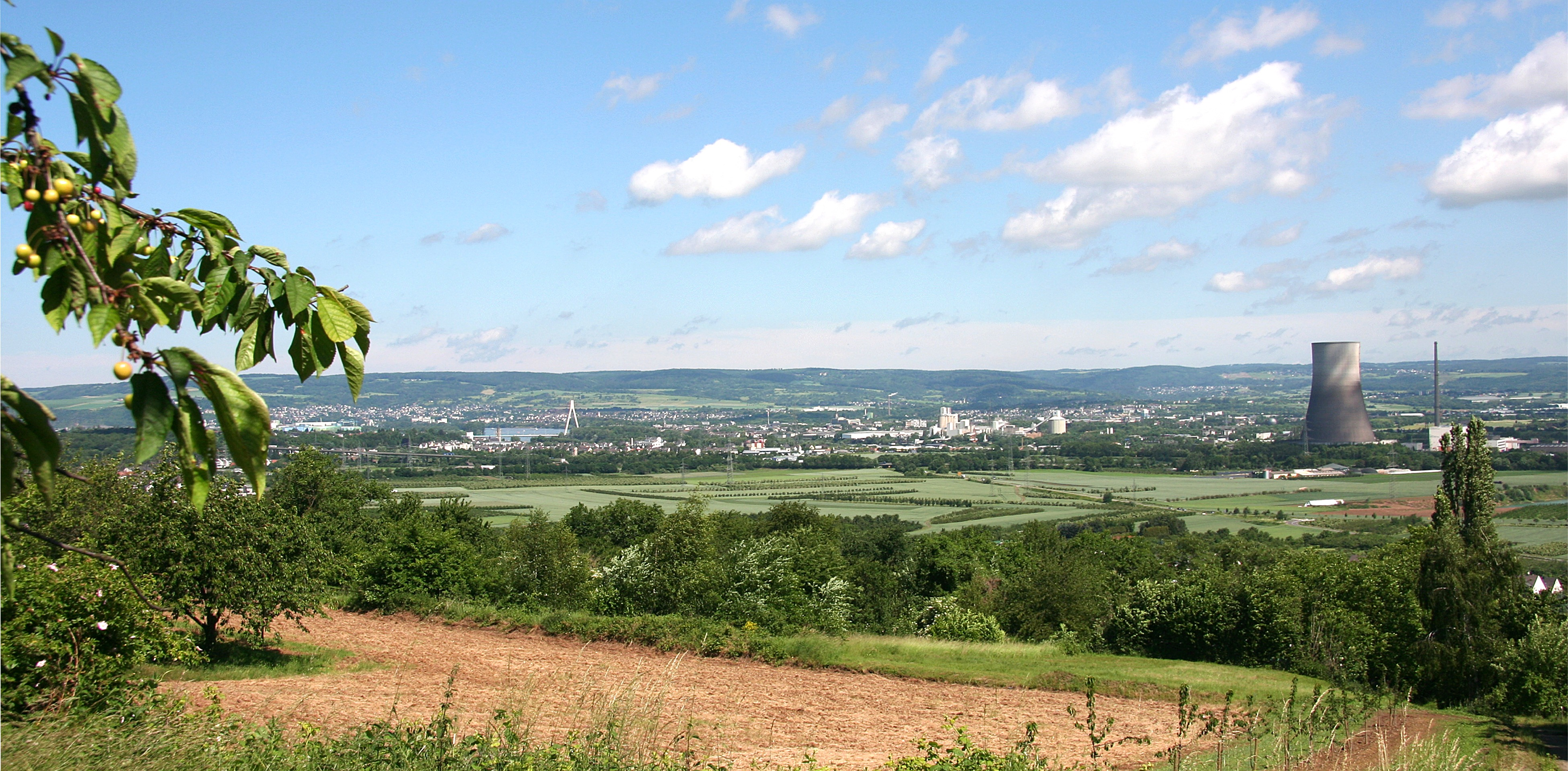 Blick vom Kärlicher Berg in das Neuwieder Becken, links die Städte Andernach, Weißenthurm und Neuwied, rechts das Kernkraftwerk Mülheim-Kärlich